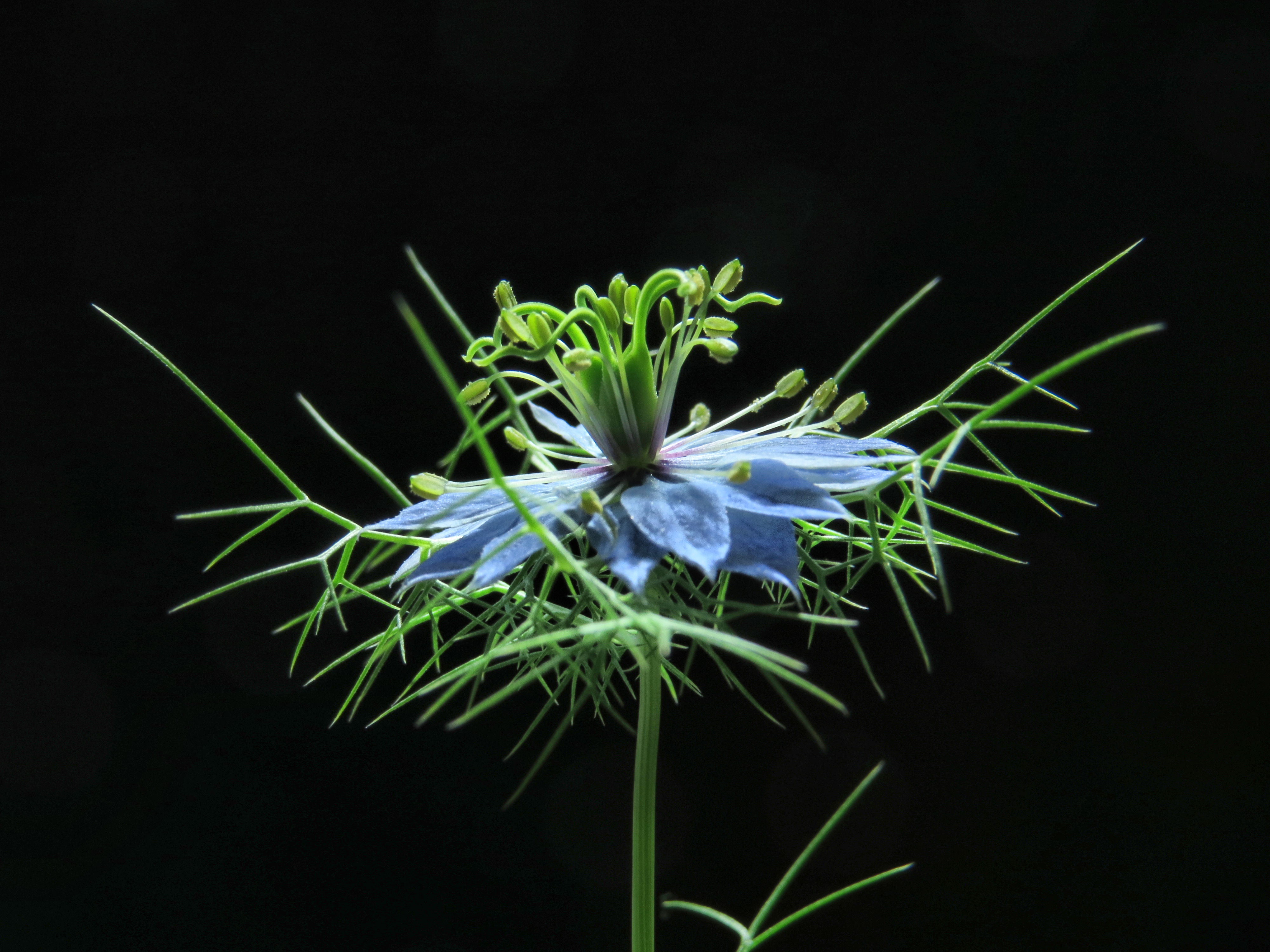 flor em fundo preto, NIgella Damascena